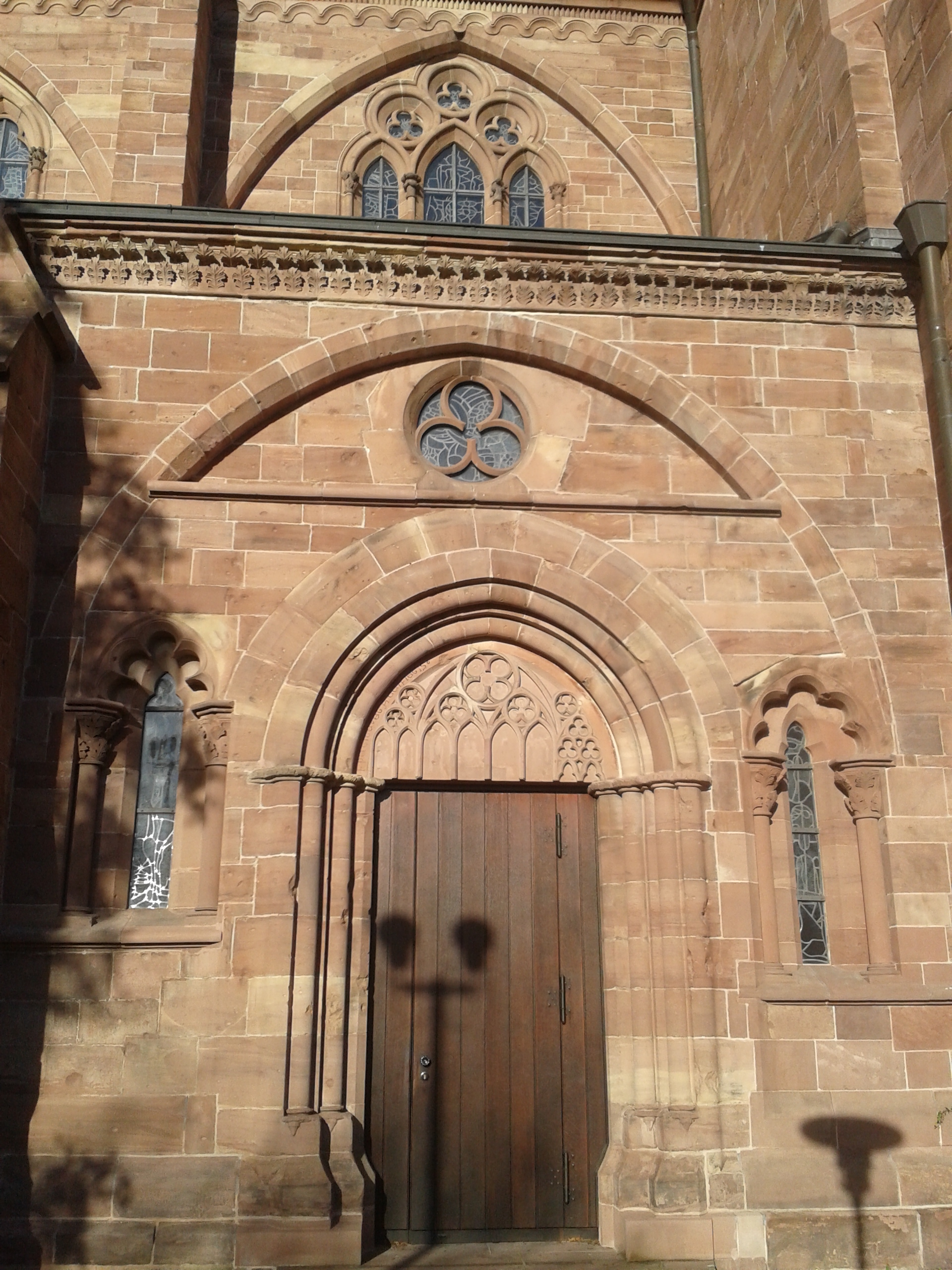 St. Michael Pforzheim Südportal